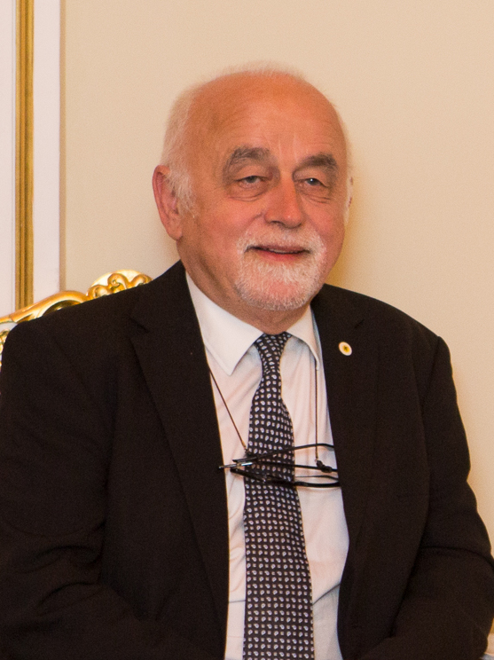 2015.gada 25.septembris. Saeimas priekšsēdētāja Ināra Mūrniece tiekas ar Beļģijas Karalistes Flandrijas reģiona parlamenta spīkeru Janu Pēmanu (Jan Peumans). Foto: Ernests Dinka, Saeimas Kanceleja Izmantošanas noteikumi: saeima.lv/lv/autortiesibas